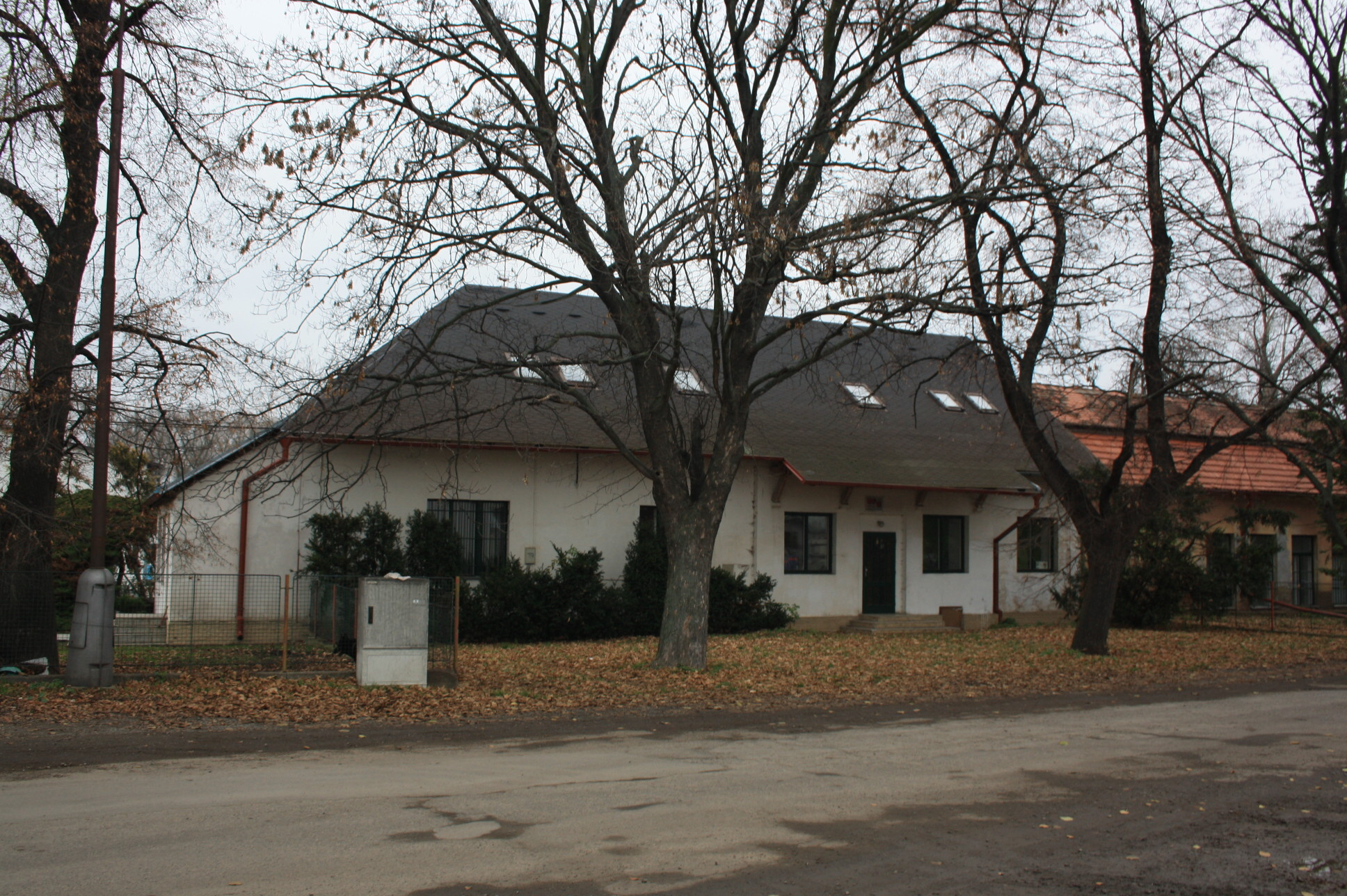 Budova v Horňátkách.